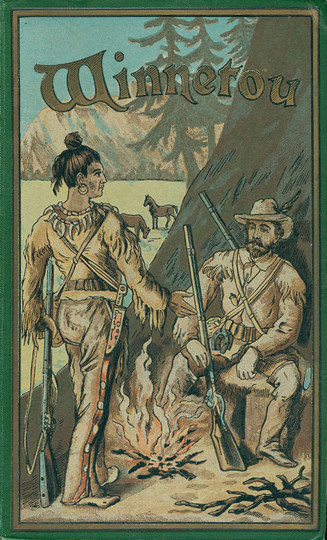 Buchdeckel der klassischen Ausgaben (ab 1893) der Bände Winnetou I bis III von Karl May.